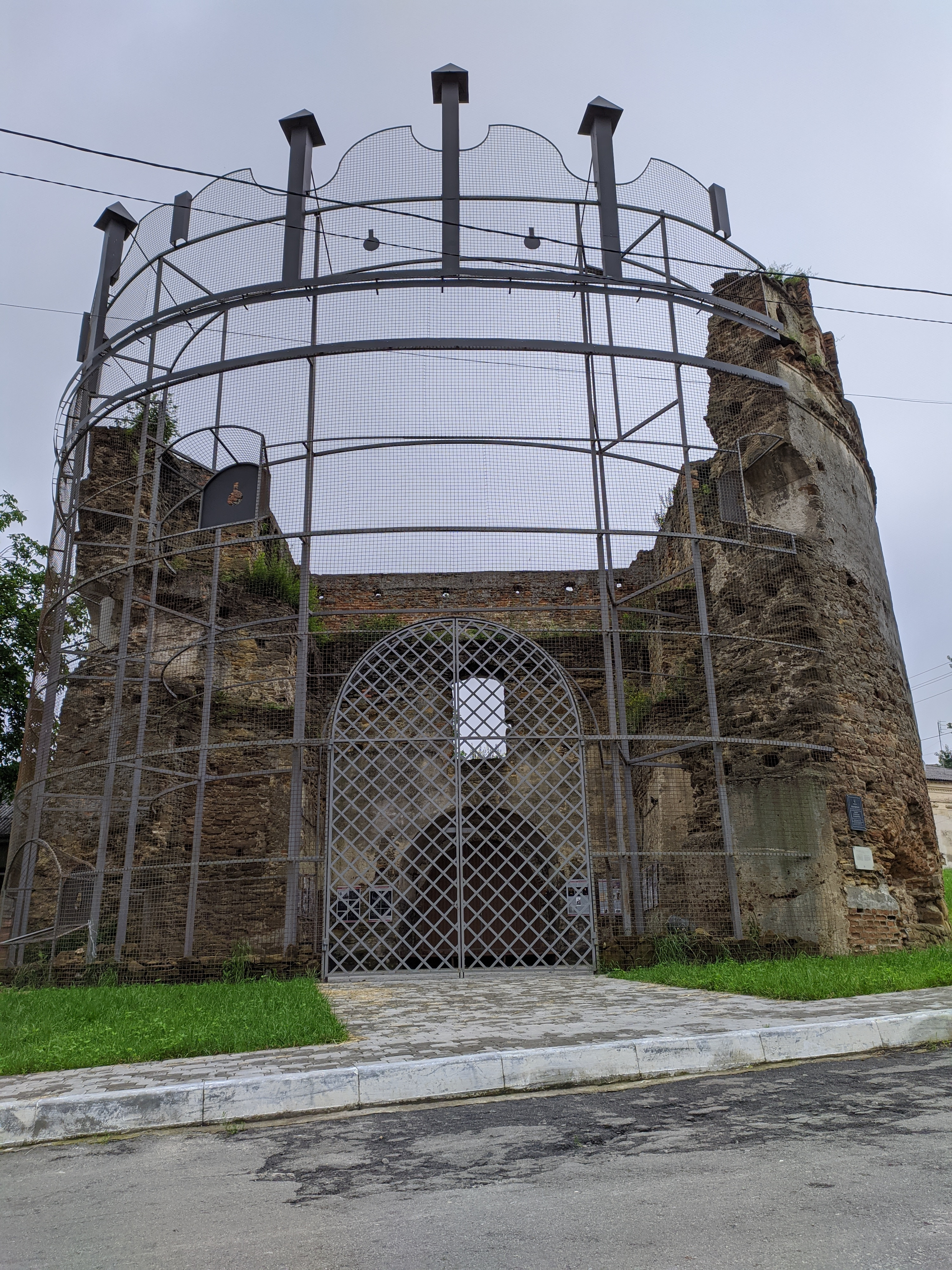 Татарська вежа ворота